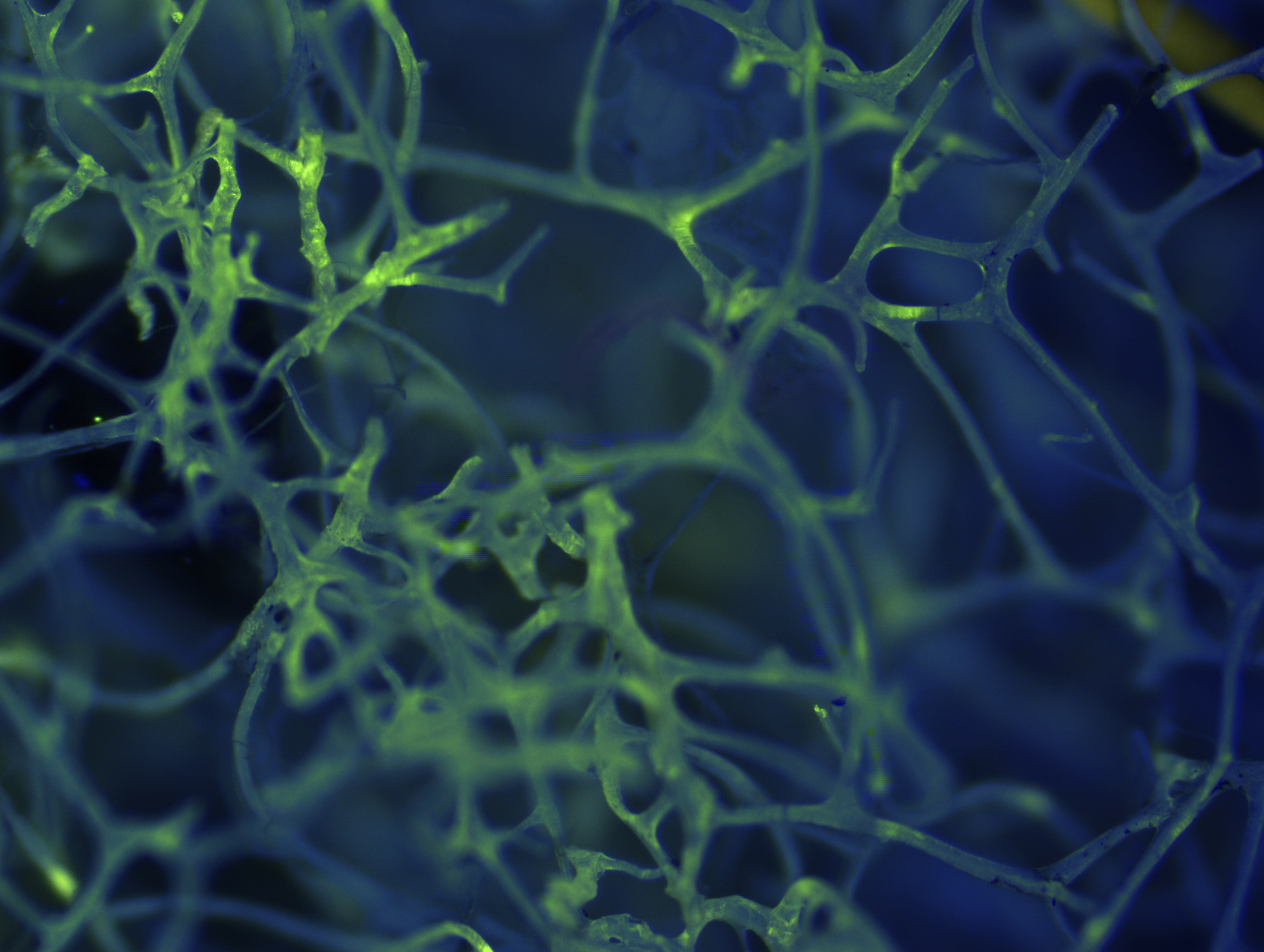 Houbovec (Porifera), foceno pod fluorescenčním mikroskopem.